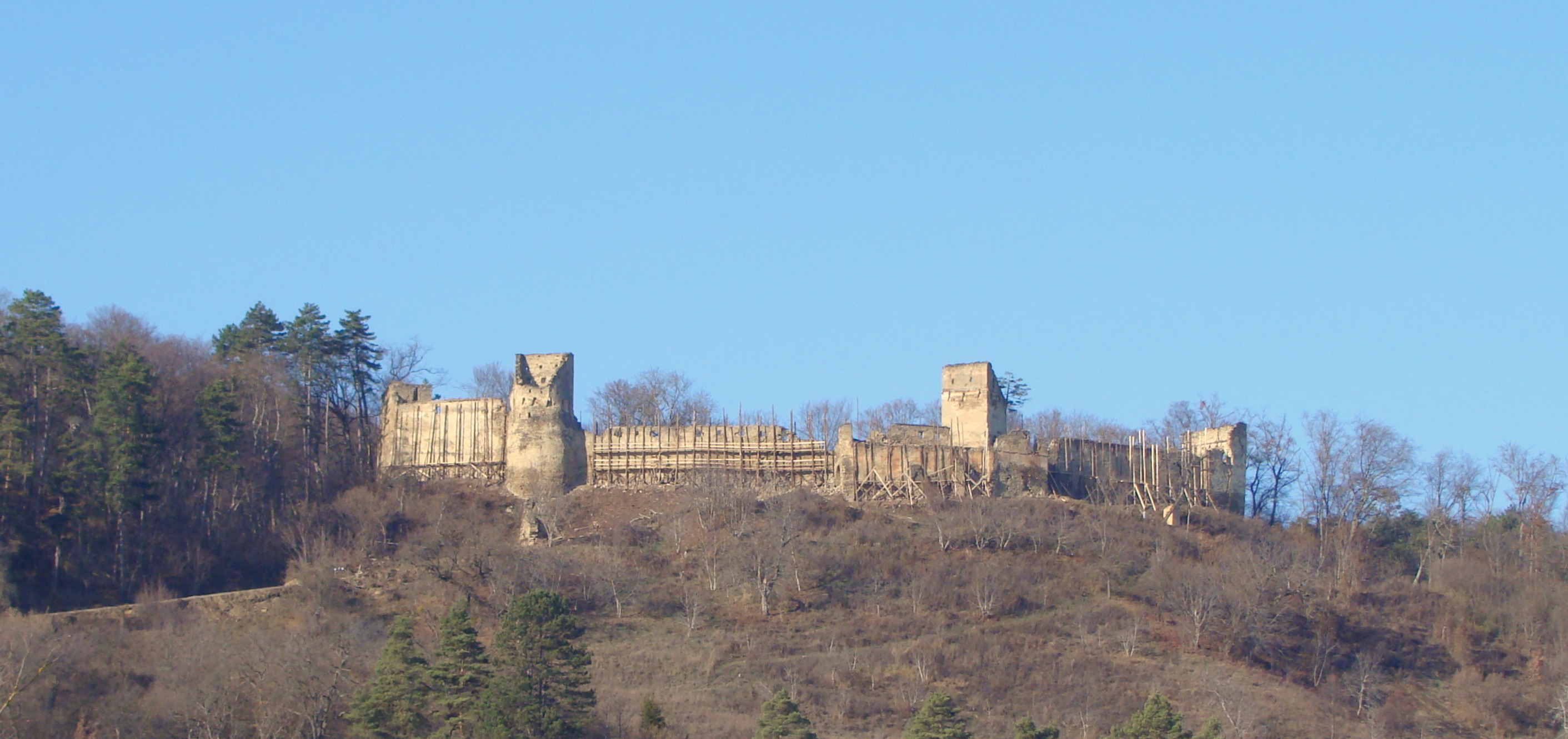 Cetate de refugiu, sat Saschiz; comuna Saschiz Pe platoul unui deal, la vest de localitate sec. XIV - XVIII